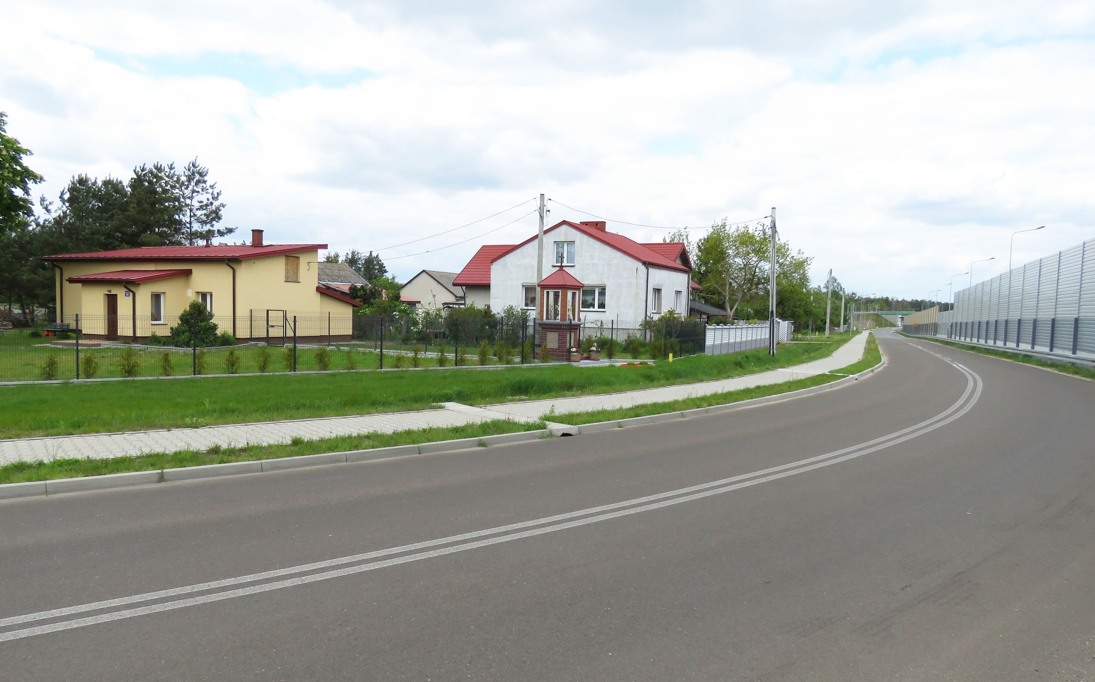 Przeszkoda. gm.Żabia Wola